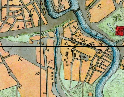 Карта Кожевников